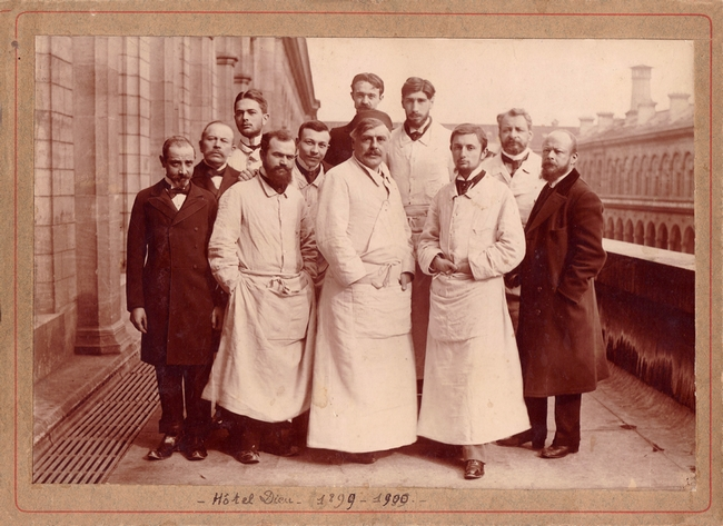 Édouard Brissaud et ses collaborateur du service, Hôtel-Dieu, Paris 1899. Photographe anonyme, collection personnelle du déposant. Taille originale du carton : 13,5 x 18,5 cm. Noms des personnages reportés au dos.